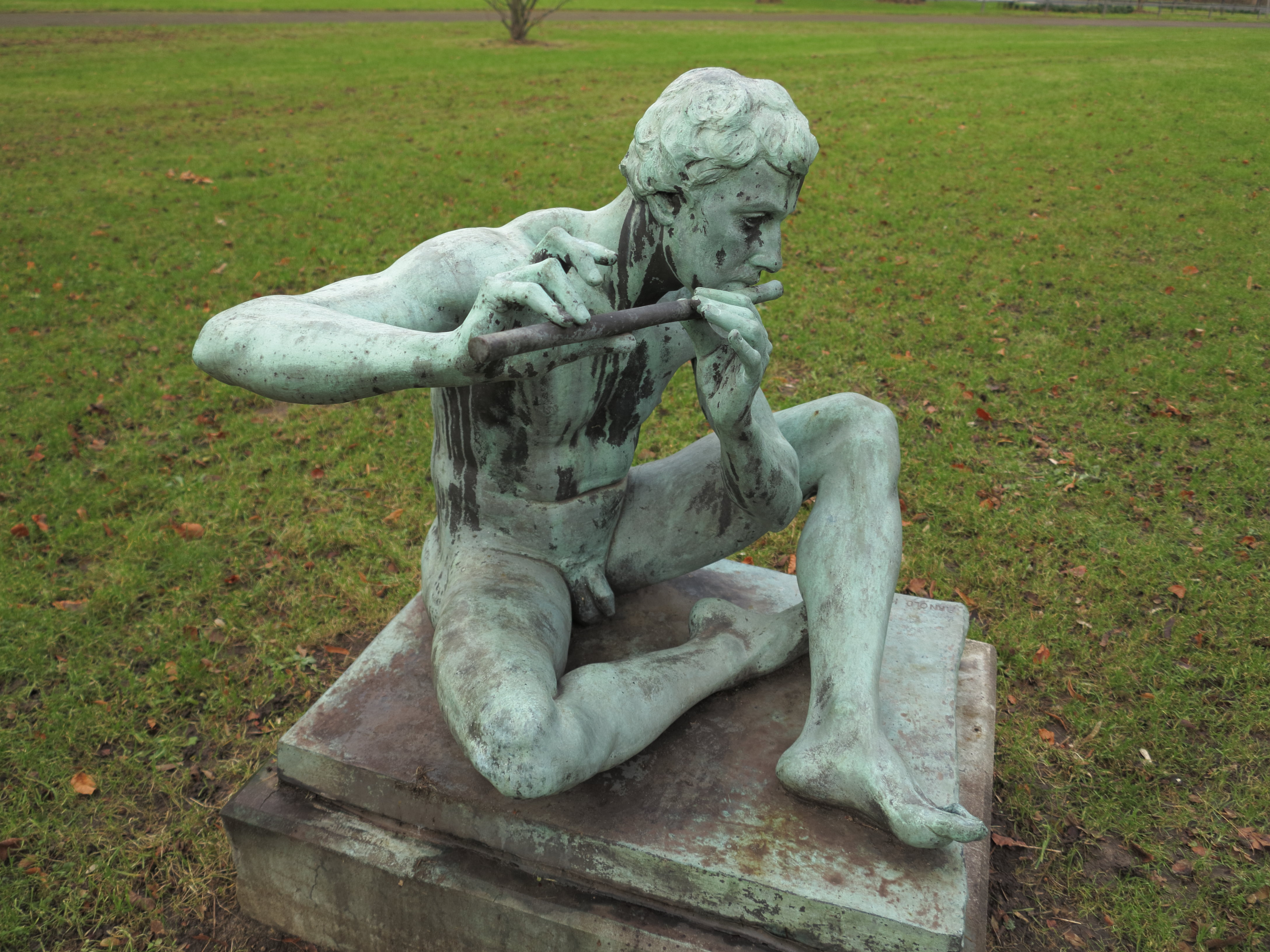 Die Bronze-Skulptur "Hockender Flötenspieler" von Arnold Kramer von 1910/1911. Sie befindet sich in Braunschweig in der Grünanlage am Hohetorwall. 2013 wurde sie von ihrem ursprünglichen Aufstellungsort, dem Skulpturenpark der Villa Gerloff, hierher versetzt.